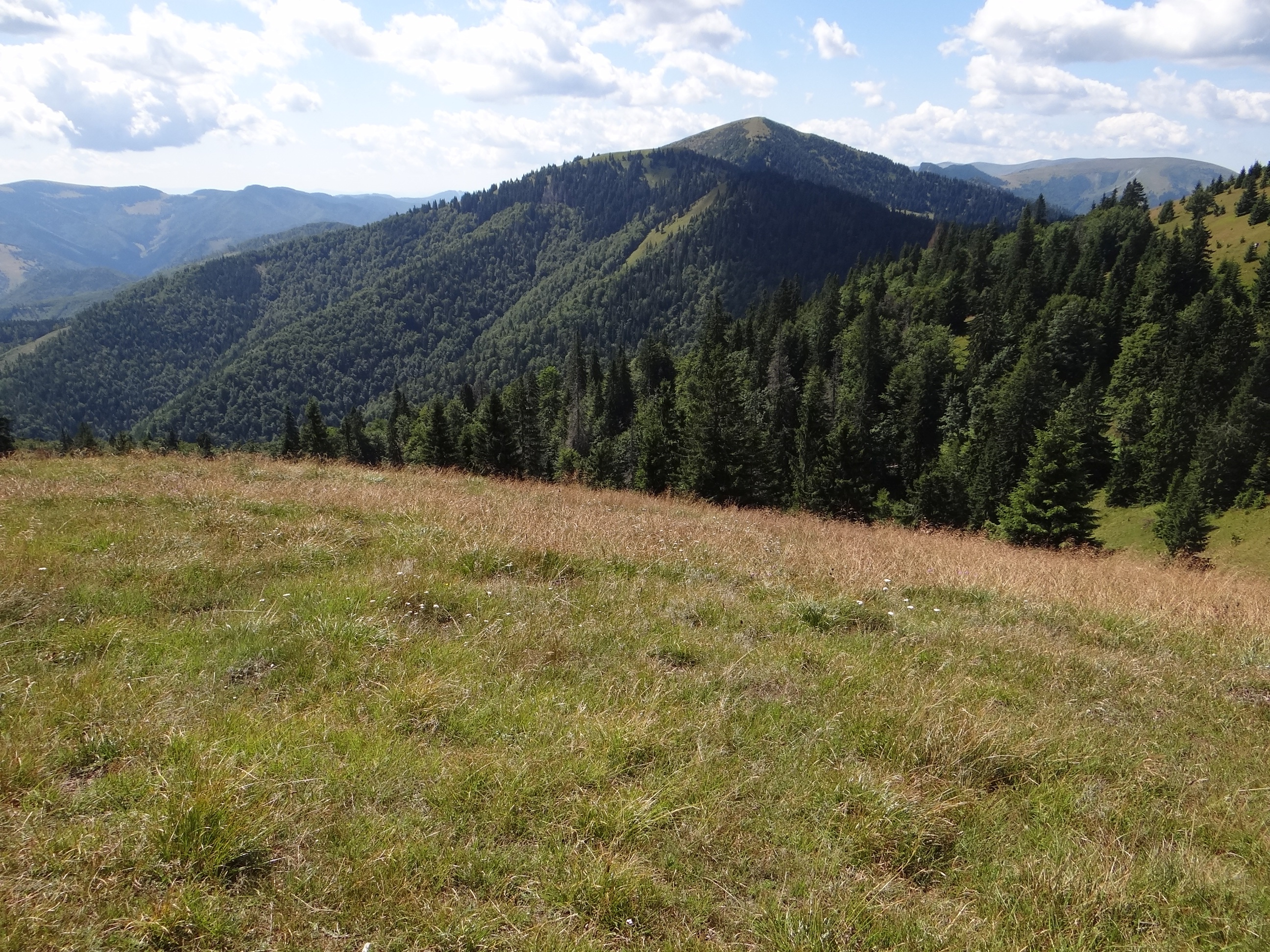 Skalná Alpa, Tanečnica, Rakytov